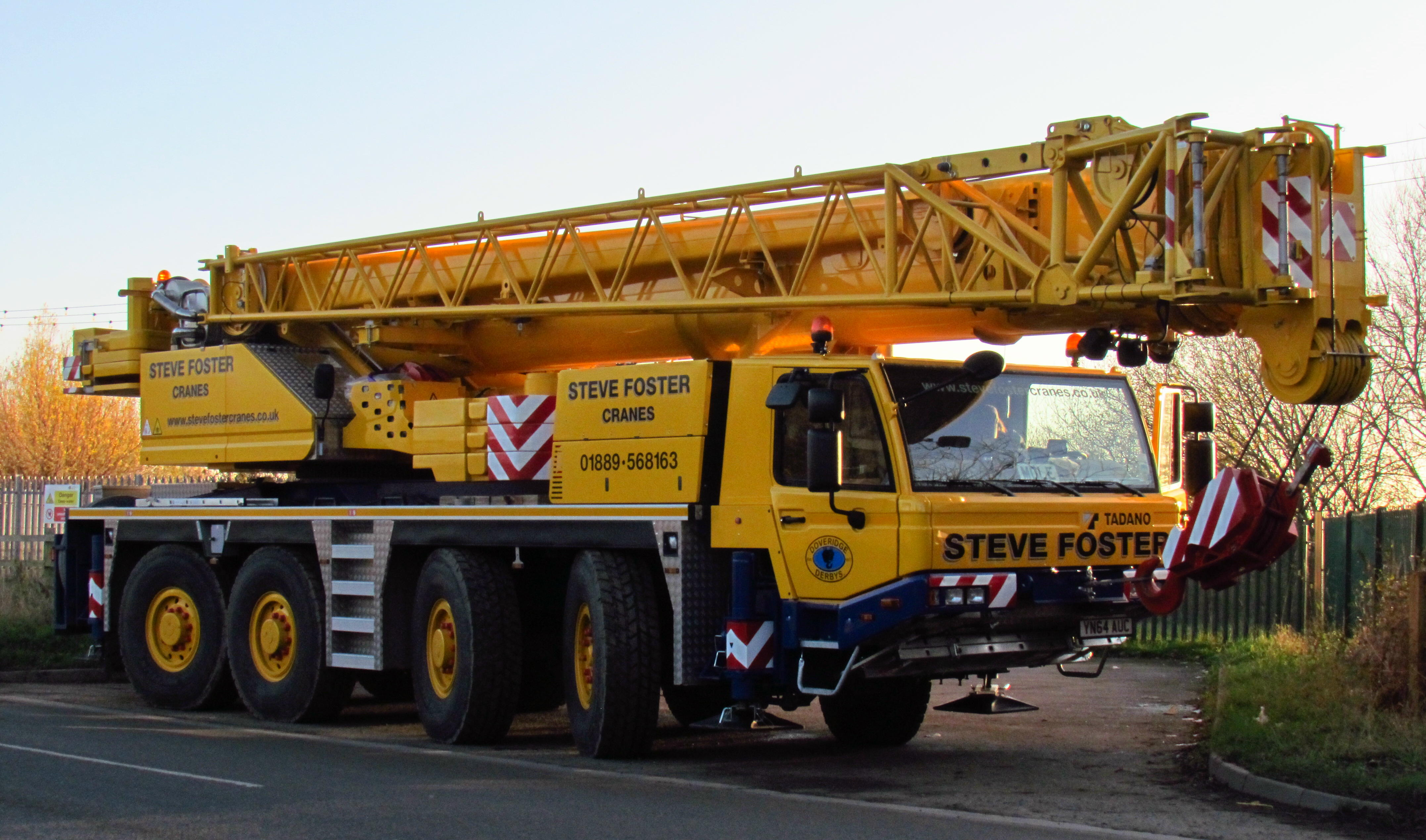 Mobile Crane